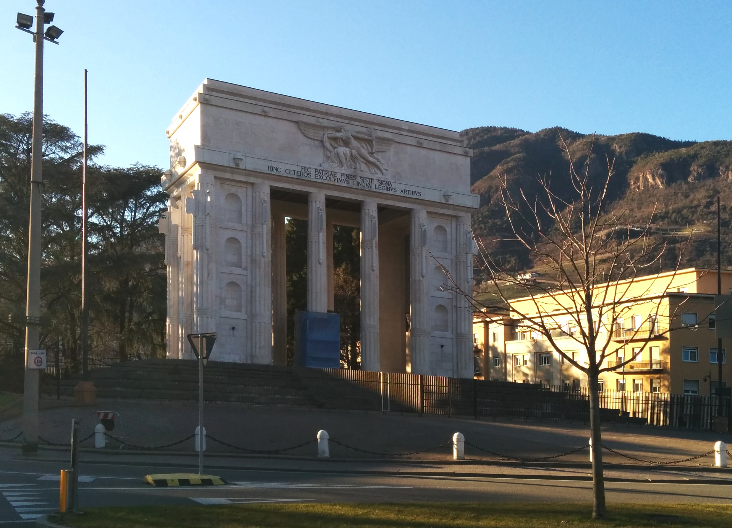 Siegesdenkmal in Bozen